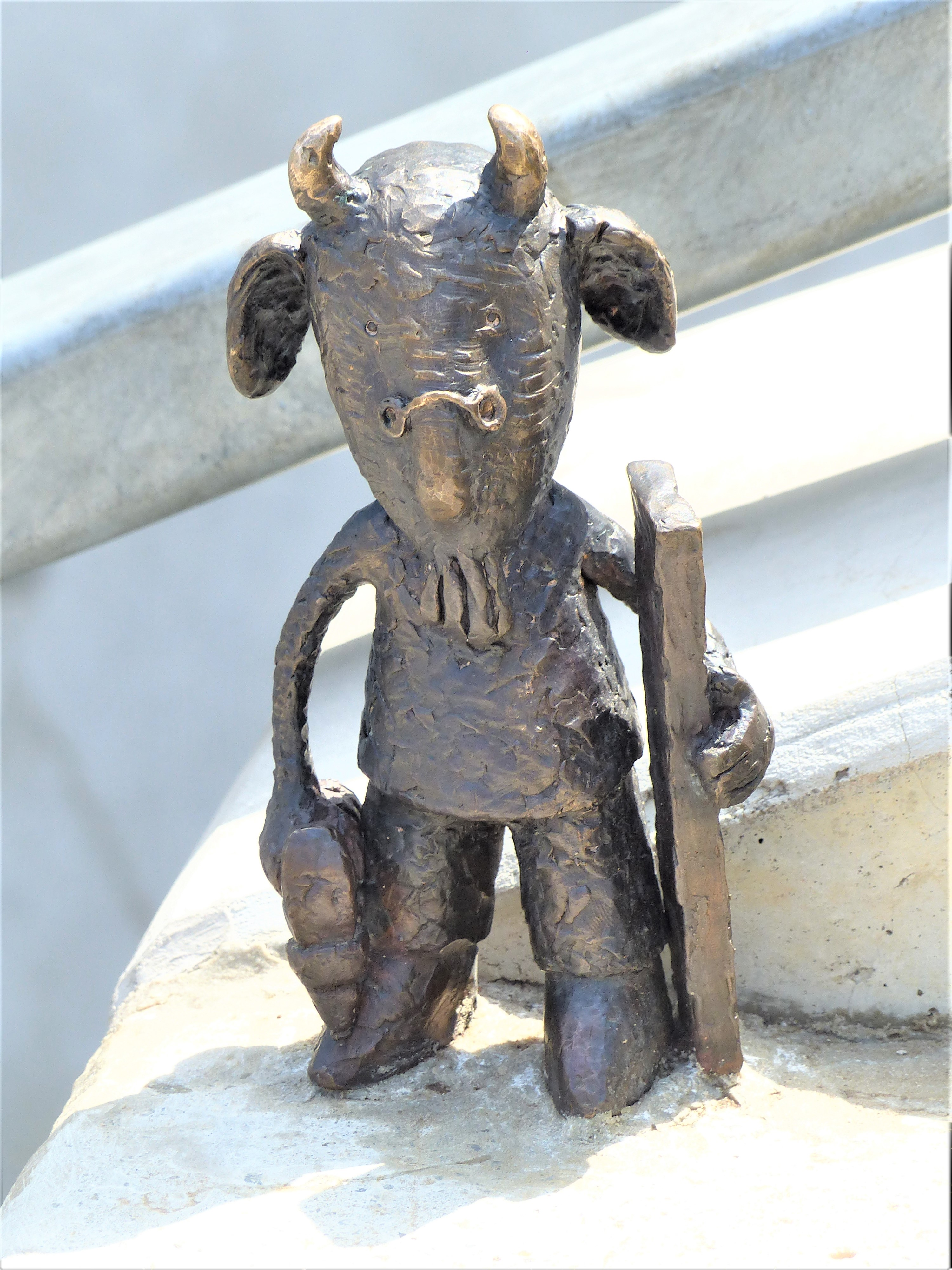 A felvétel a Széll Kálmán téren készült, 2018. július 25-én. Mekk Elek, Kolodko Mihály (Mihajlo Kolodko) szobra.